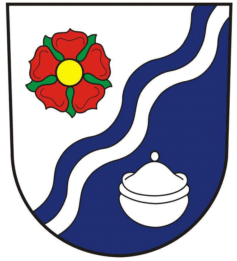 Znak obce Majdalena